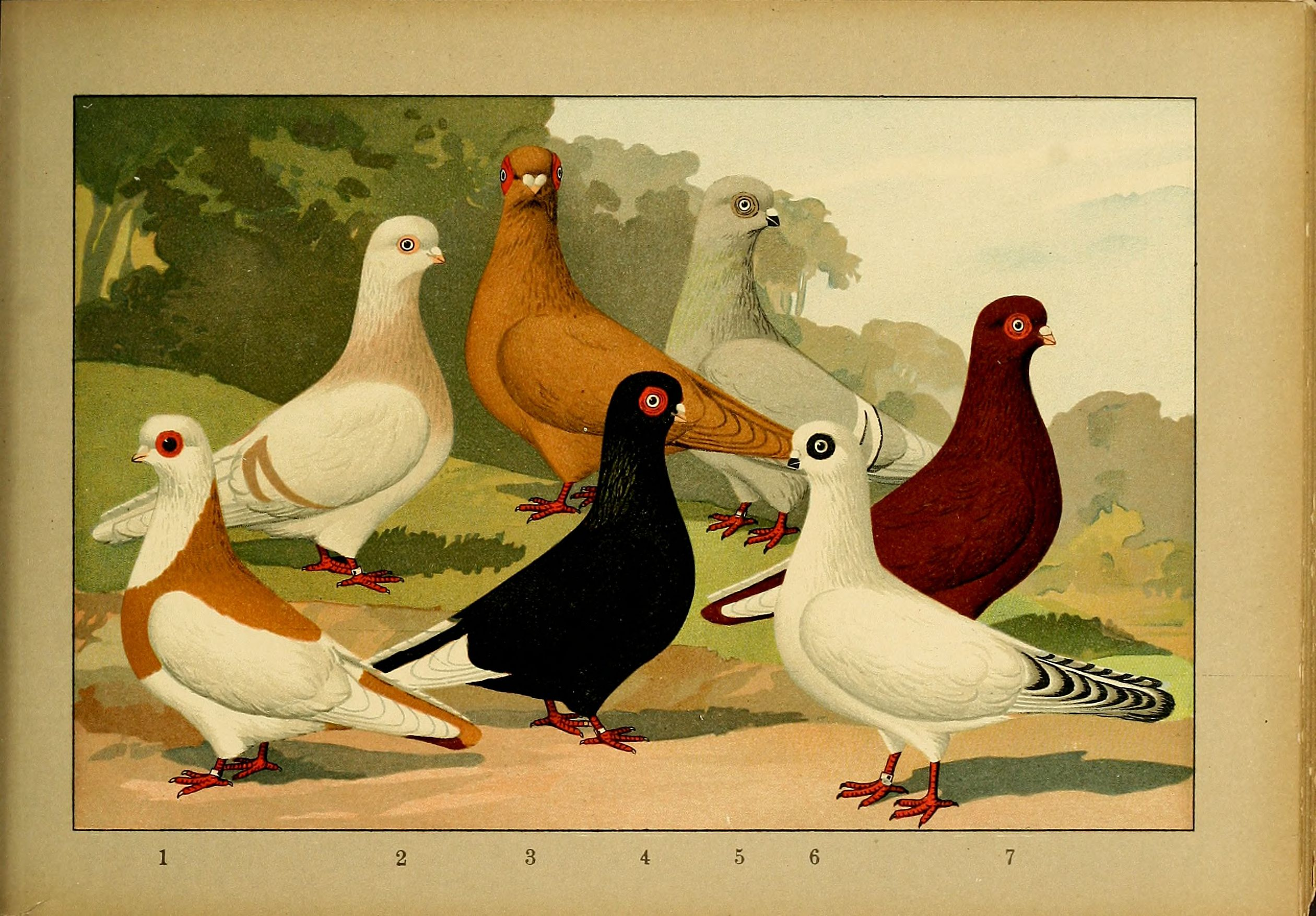 Deutsch